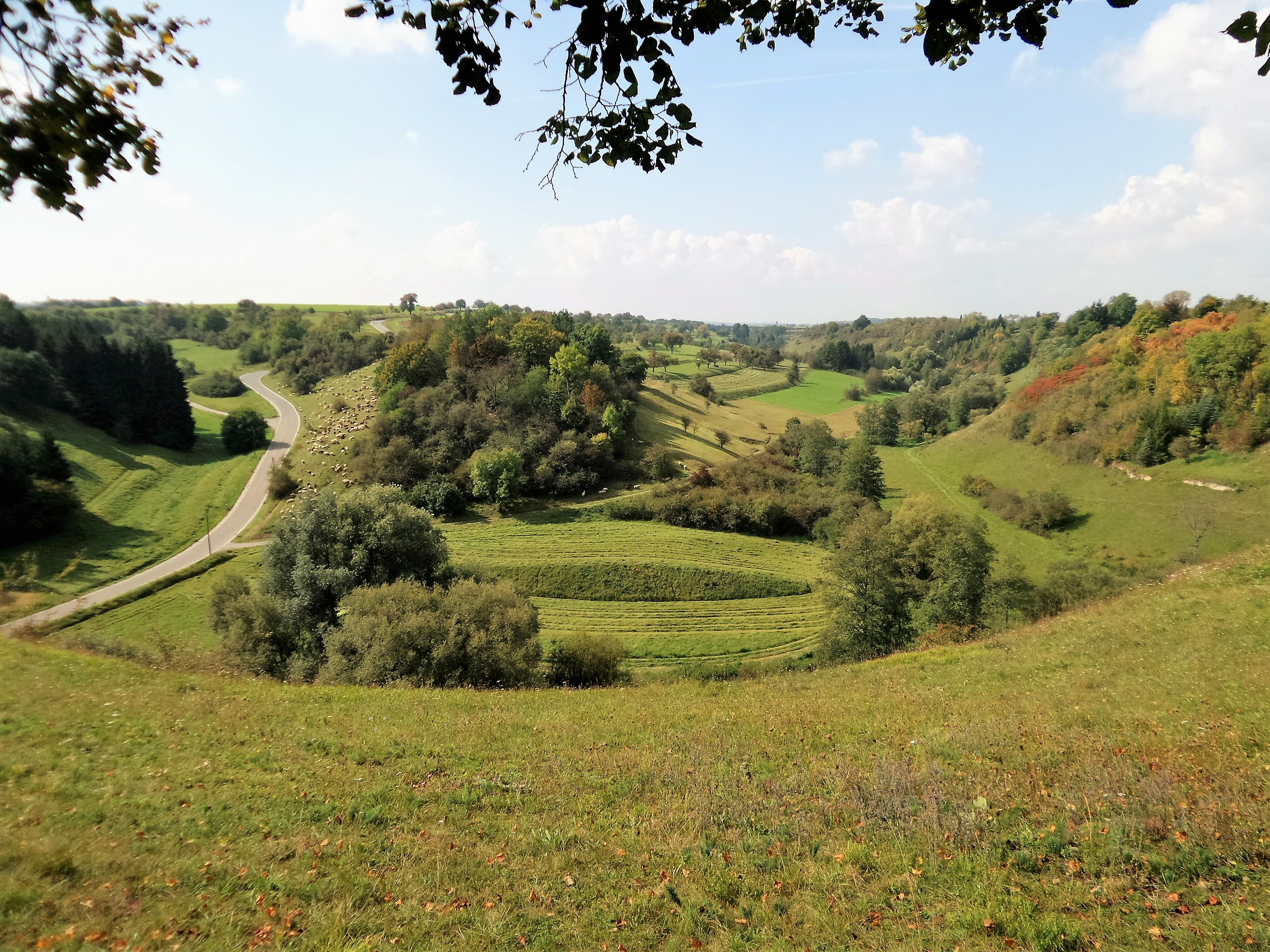 Blick vom Kirchberg im Ortsteil Reusten in der Gemeinde Ammerbuch ; Ansicht: Ost nach West